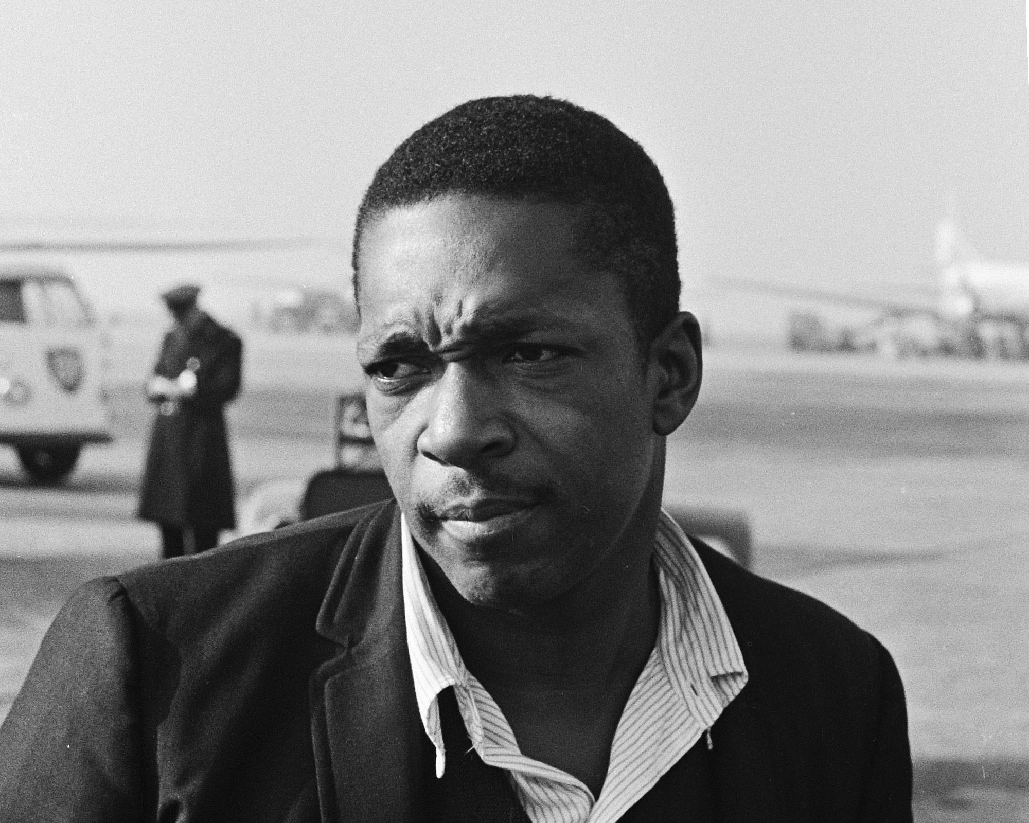 Amerikaanse jazz-saxofonist John Coltrane op Schiphol aangekomen. John Coltrane